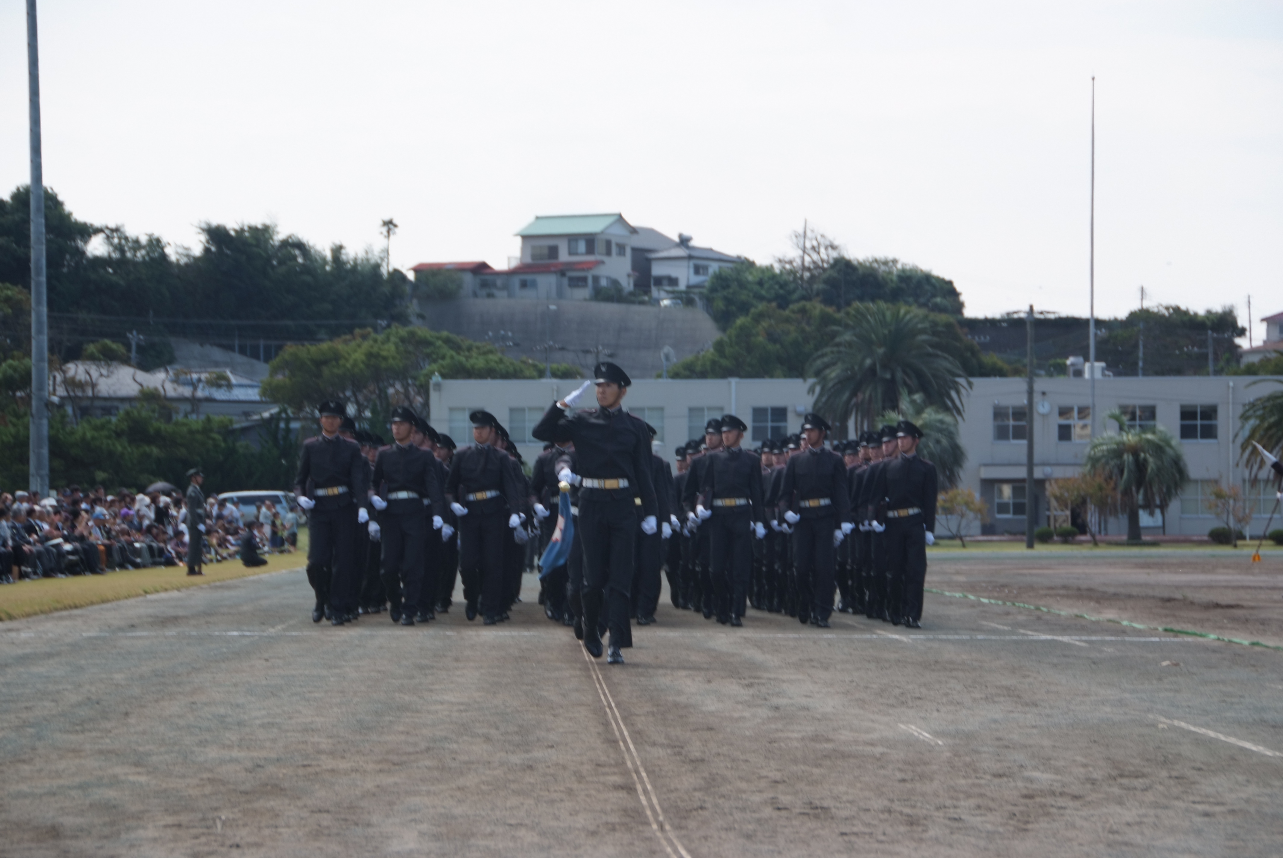 陸上自衛隊高等工科学校生徒、学校創立記念行事パレード行進にて撮影。